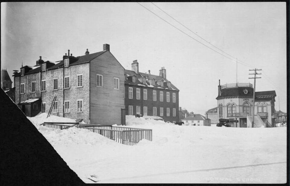 Sur l’emplacement actuel du Château-Frontenac se trouvait, entre 1886 et 1892, le kiosque Potvin.